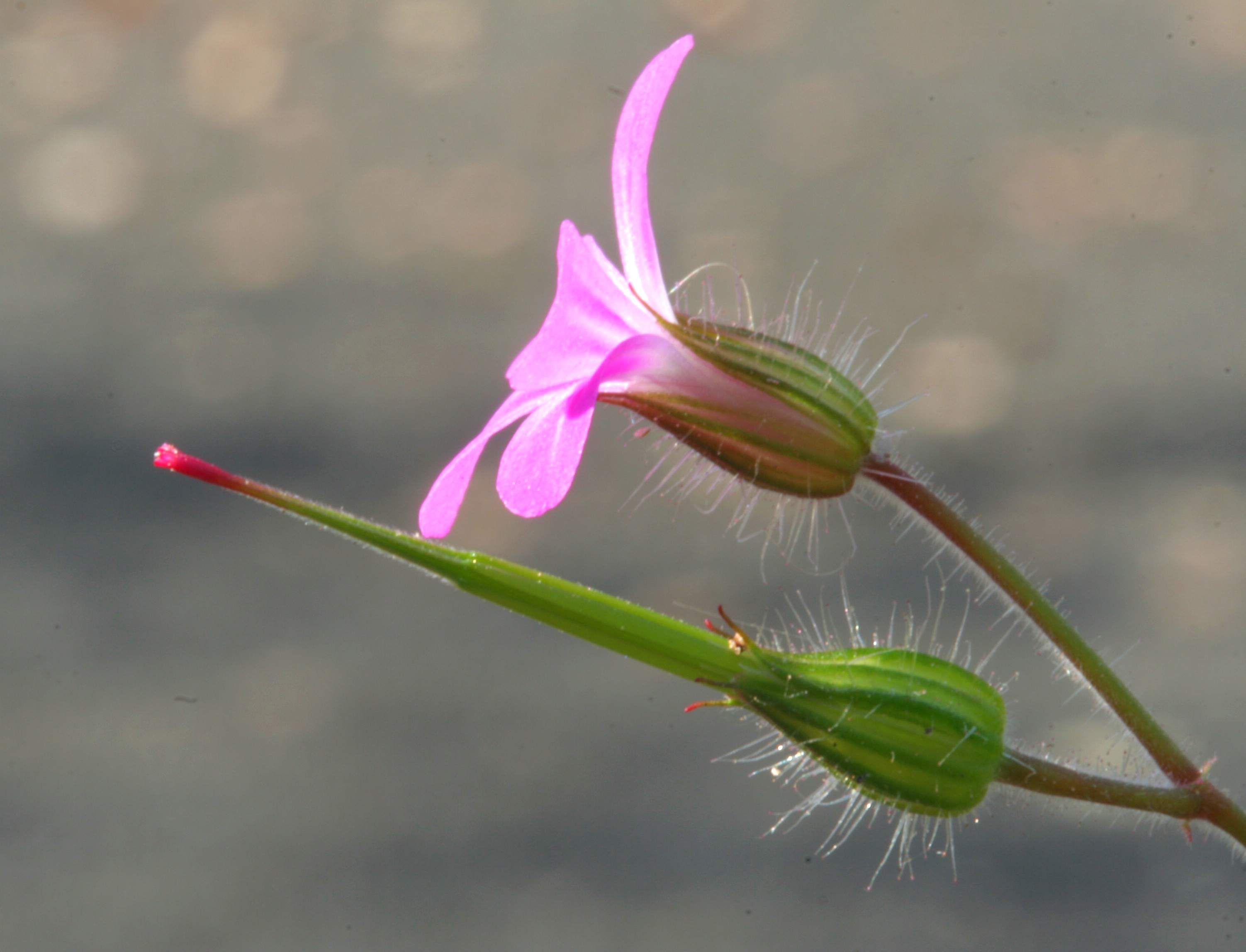 Geranio di San Roberto - Località : Visome (BL), 350 m s.l.m.